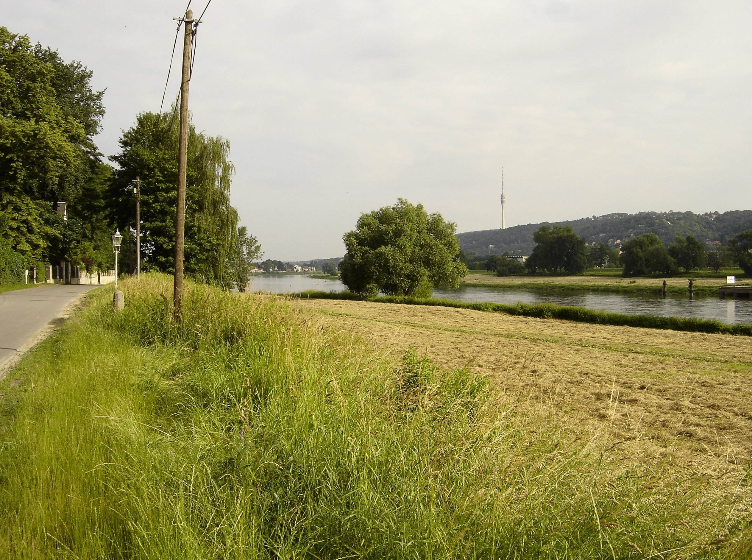 elbe at the border of Kleinzschachwitz (Kleinzschachwitzerufer), Dresden